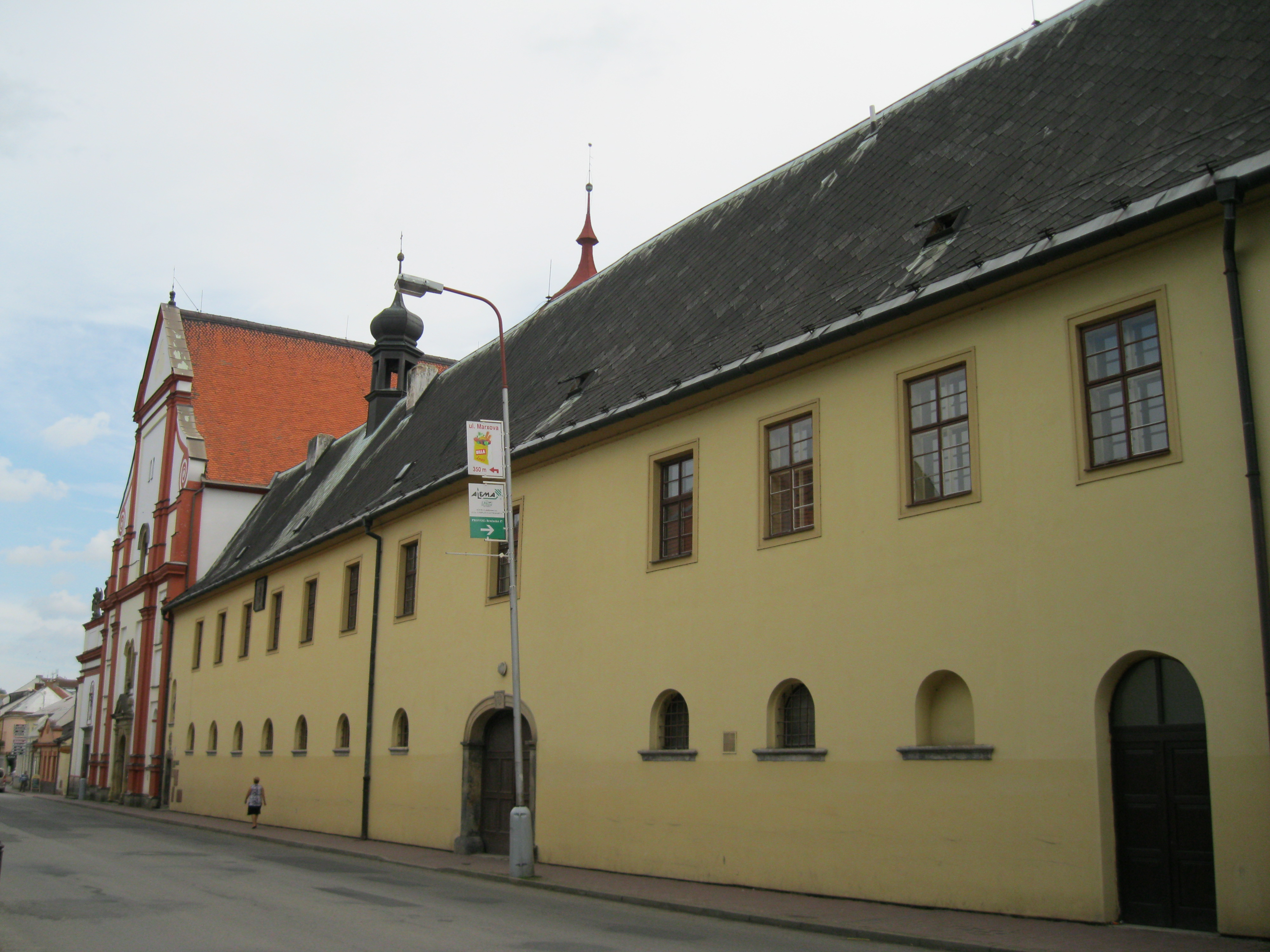 Klášter františkánský s kostelem sv. Josefa (Moravská Třebová)